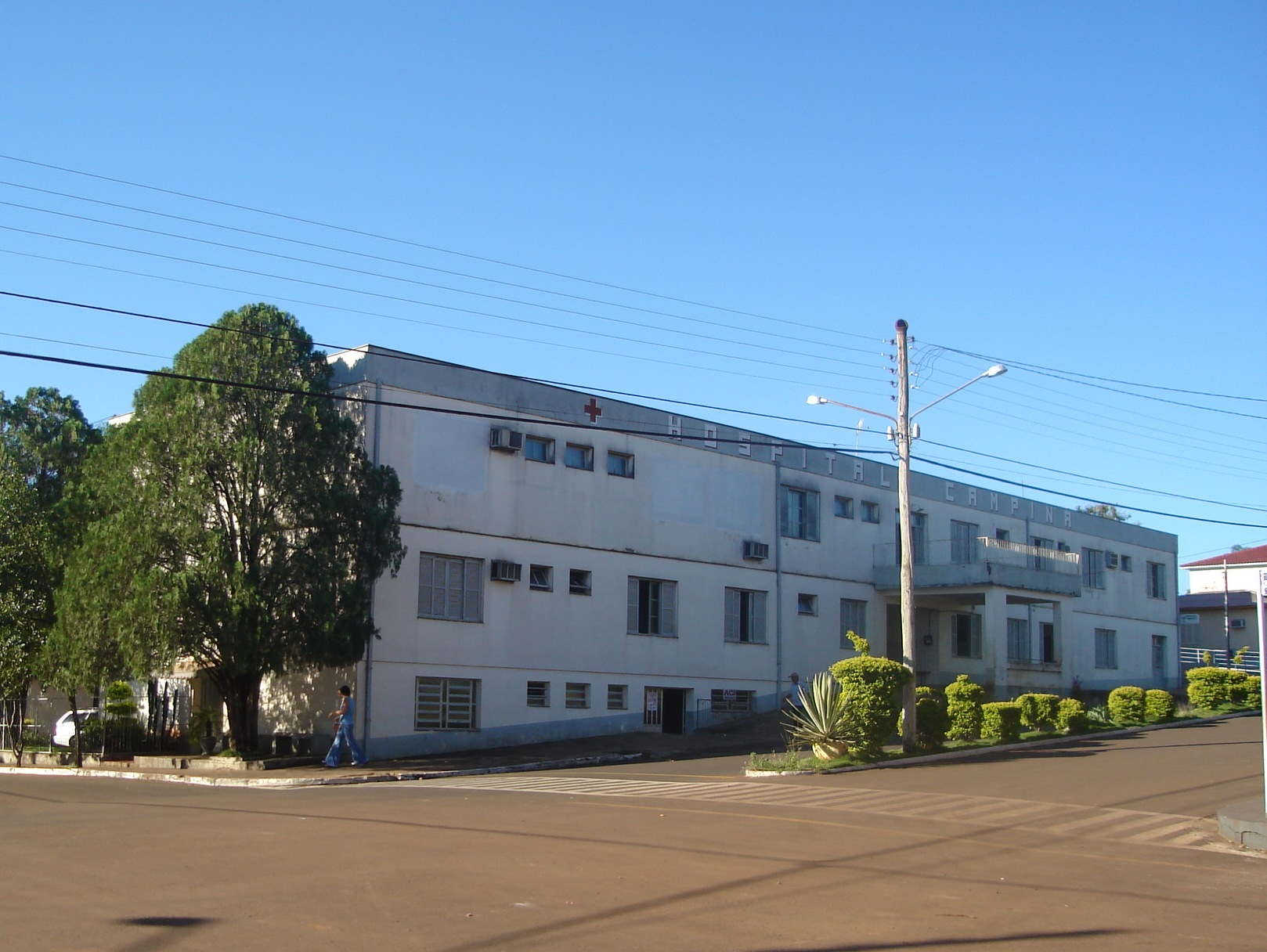 Hospital de Campina das Missões, RS.